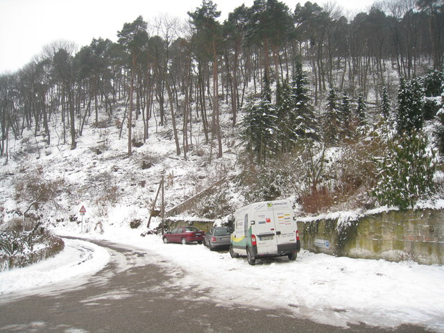 Im Meisental - Winzingen